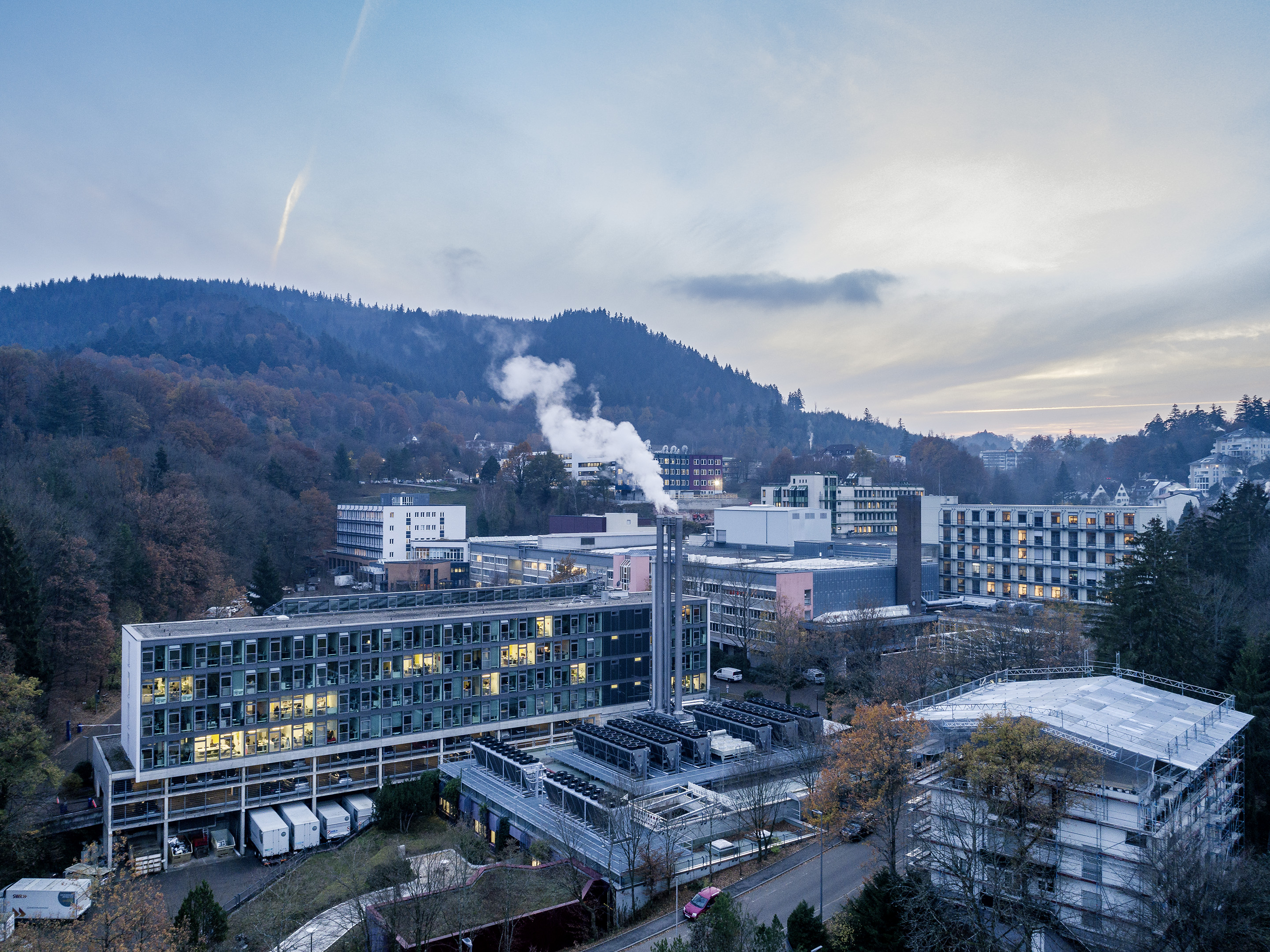 Gesamtansicht des SWR Funkhauses Baden-Baden